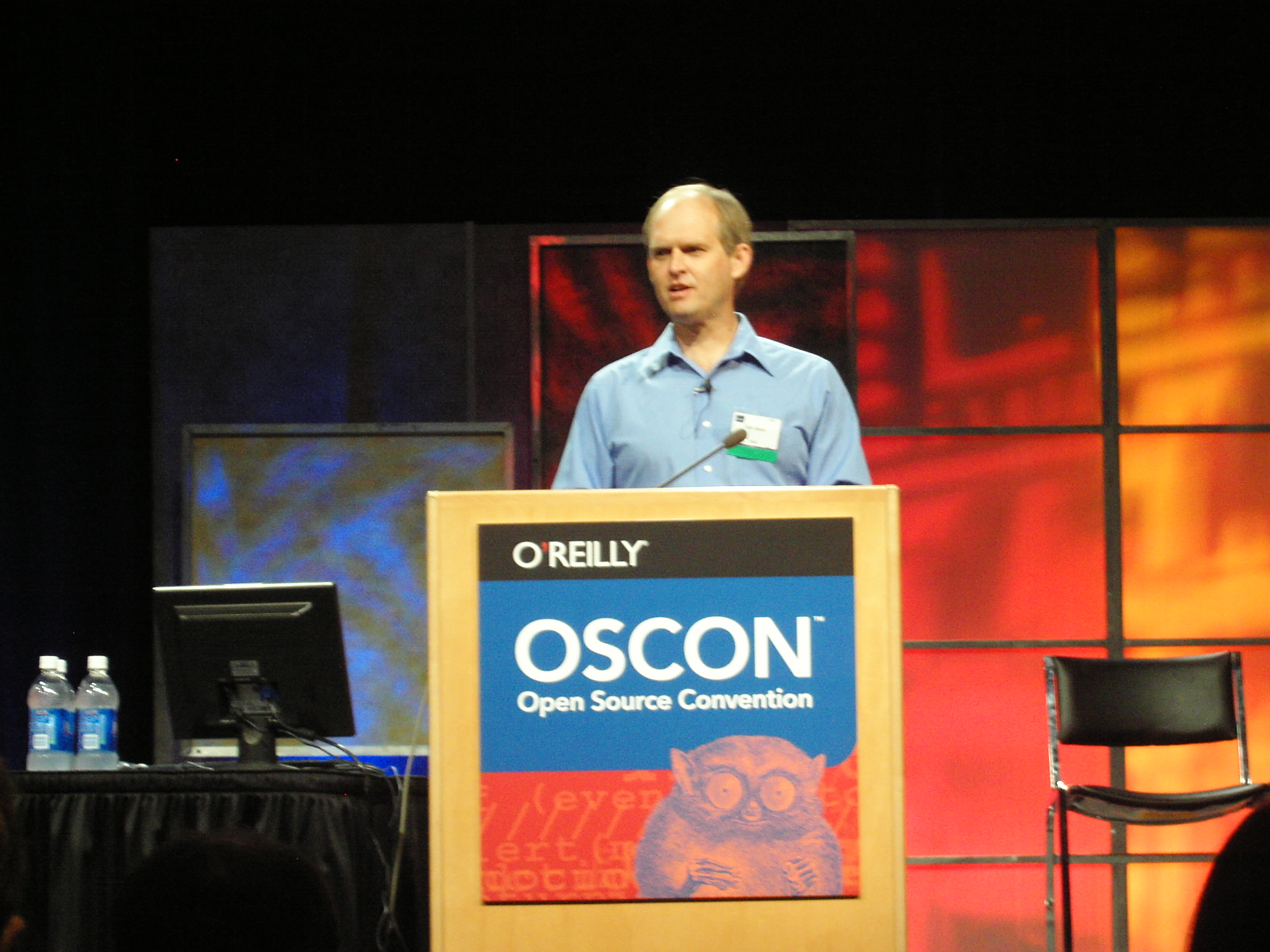 Robin Hanson talking about bias